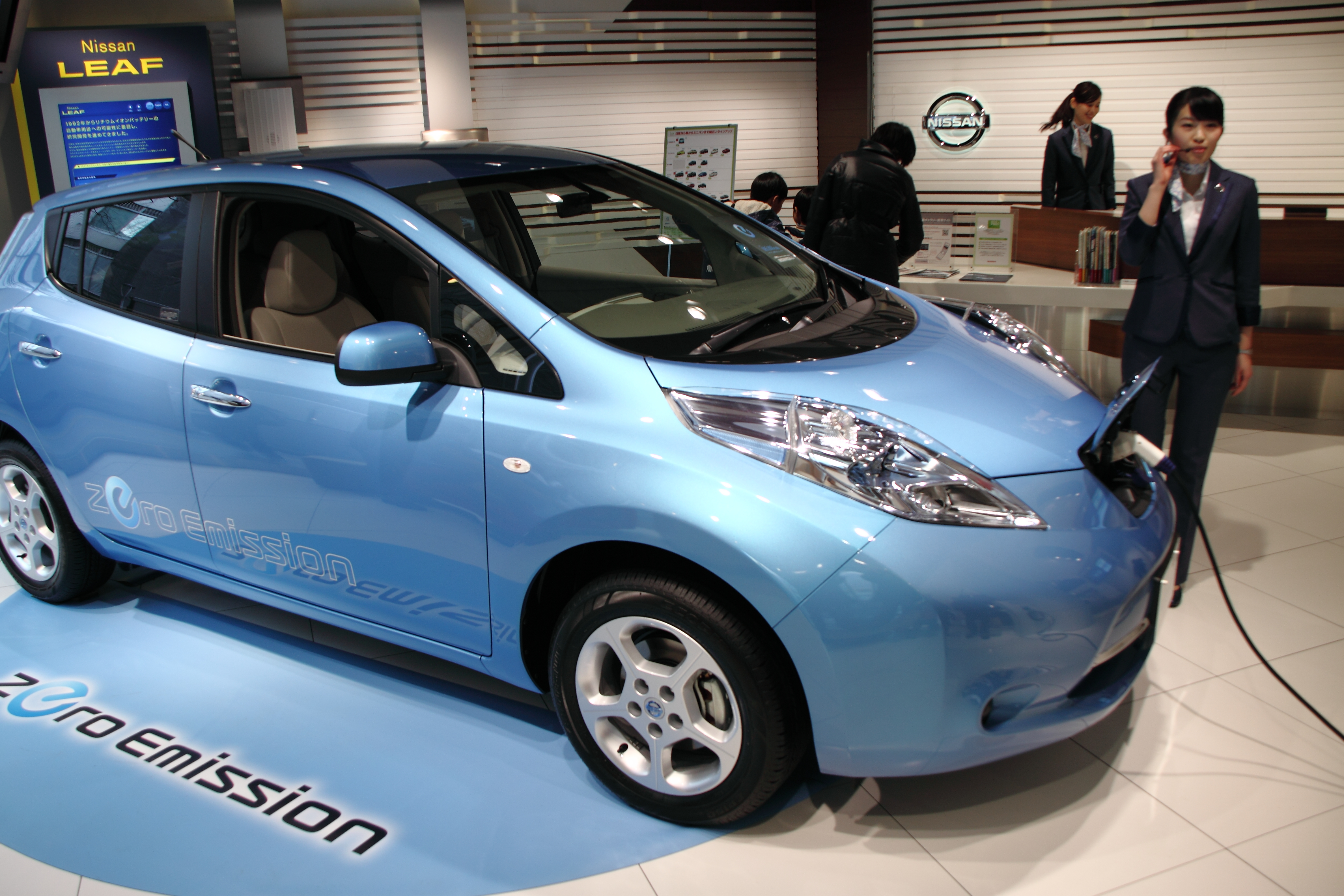 この充電プラグの位置、なんか間抜けだぞぉ。。。 ウチのような賃貸住宅の場合、充電設備が用意できないのがネック。